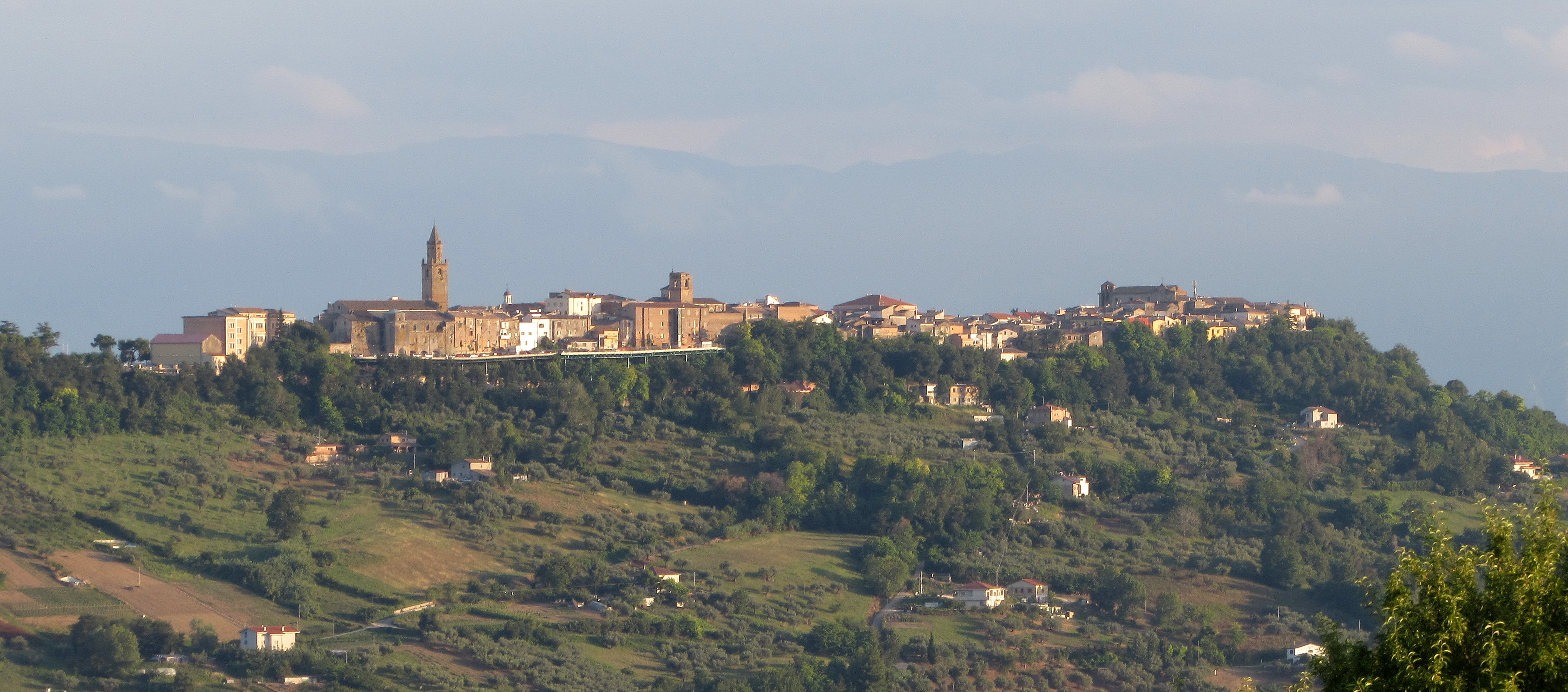 Veduta di Città Sant'Angelo